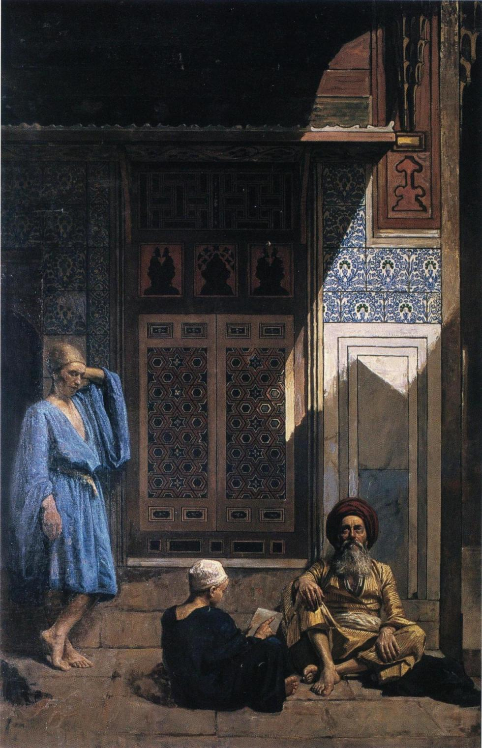 William Grommén maalaus. Maalauksen omisti aikoinaan Viipurin historiallinen museo, nykyään Lahden historiallinen museo.